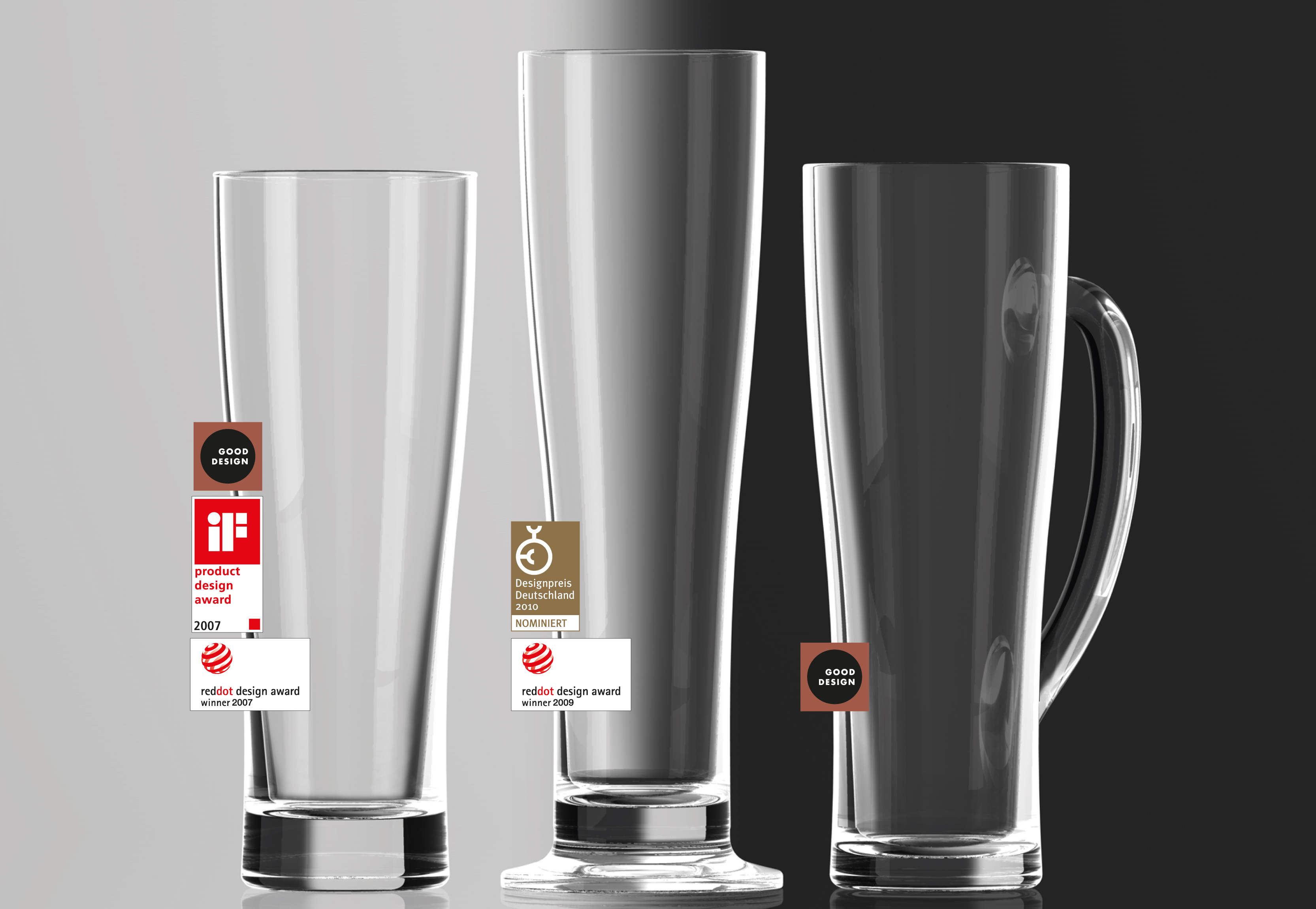 Aspen Familie